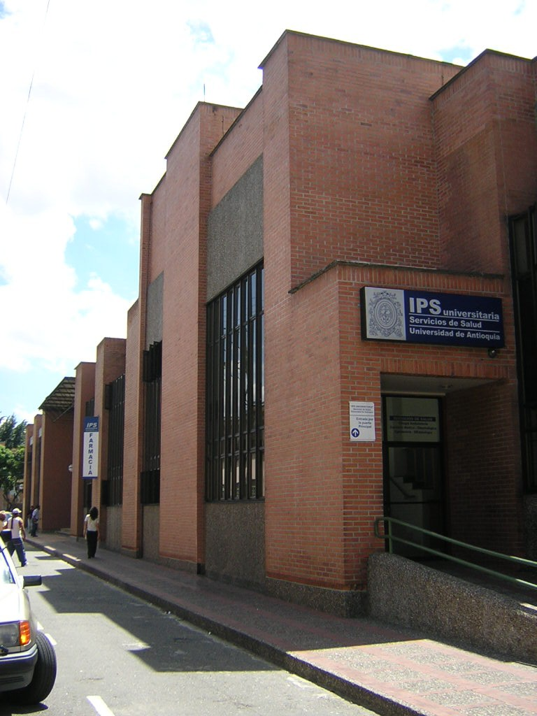 IPS Universitaria, Área de la Salud, Universidad de Antioquia, Medellín, Colombia (esta foto la tome yo, y la libero al dominio público)